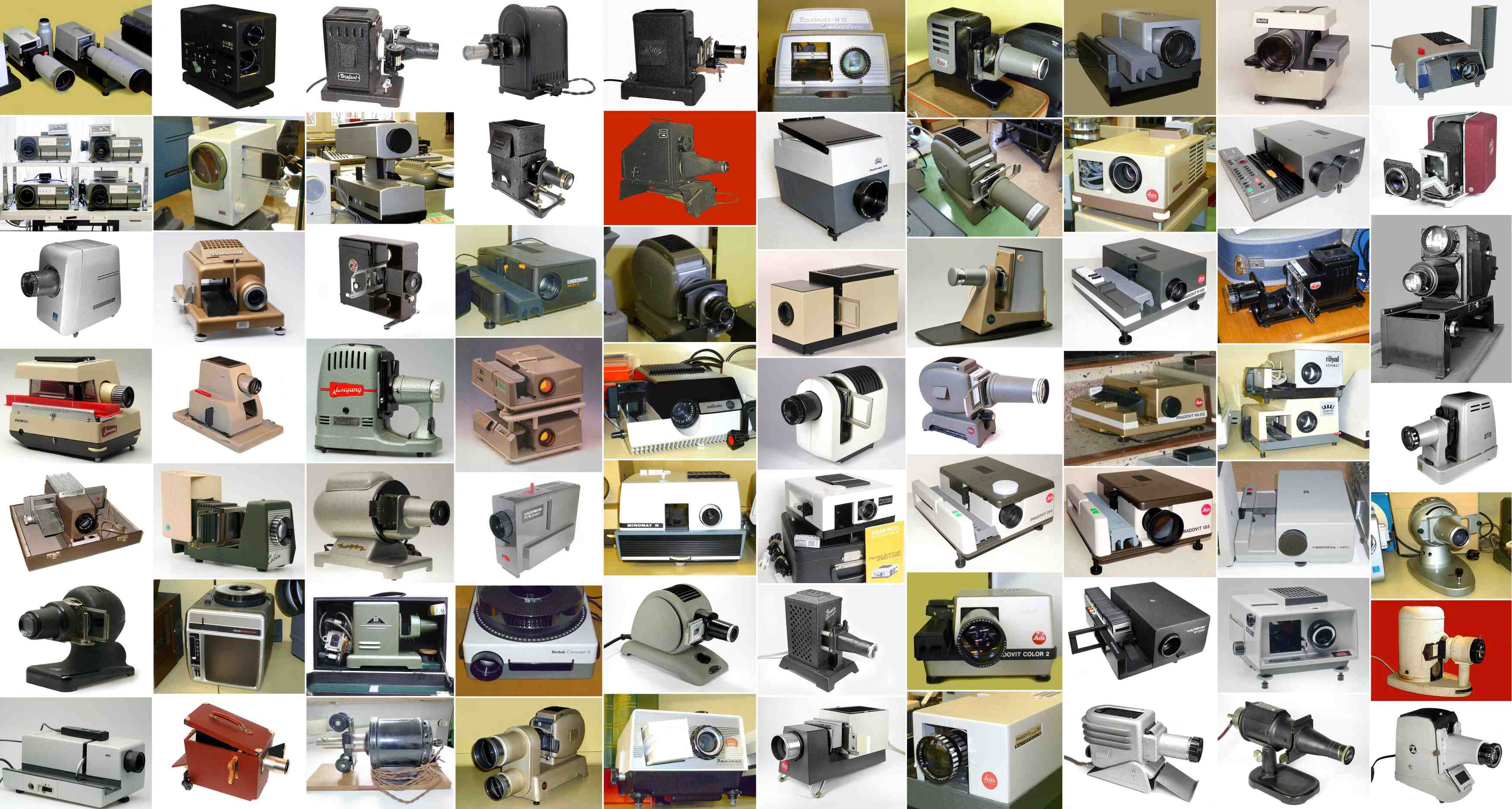 Collage aus den Exponaten des Deutschen Kameramuseums: Projektoren